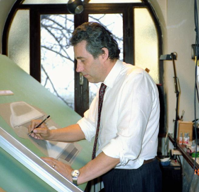 Paolo martin working